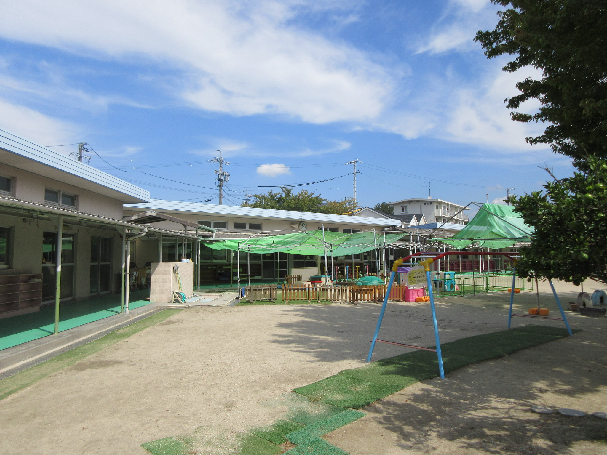 岡崎市稲熊保育園（岡崎市稲熊町）